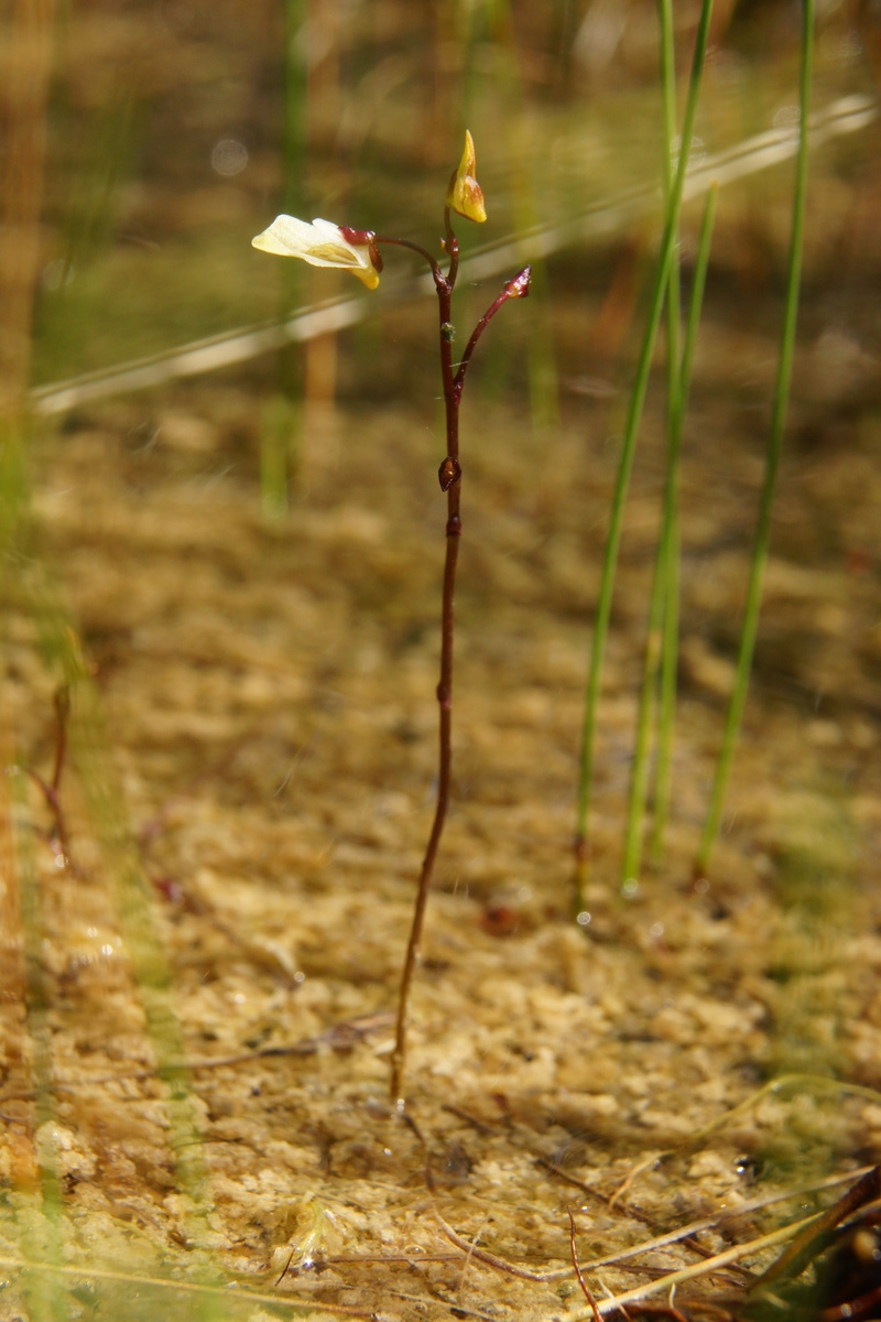 Mala mešinka v Godičevem.